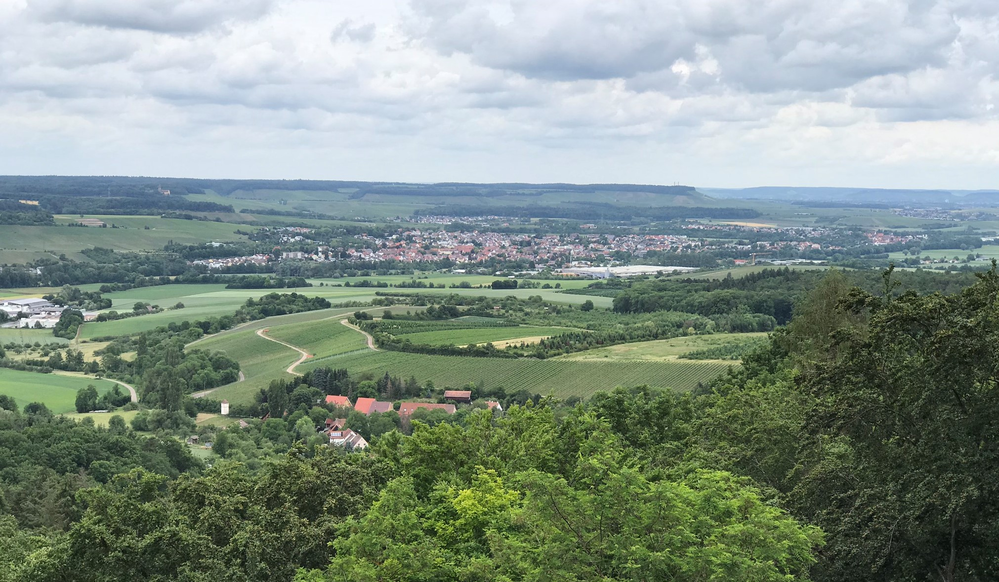 Güglingen ( Stromberg)